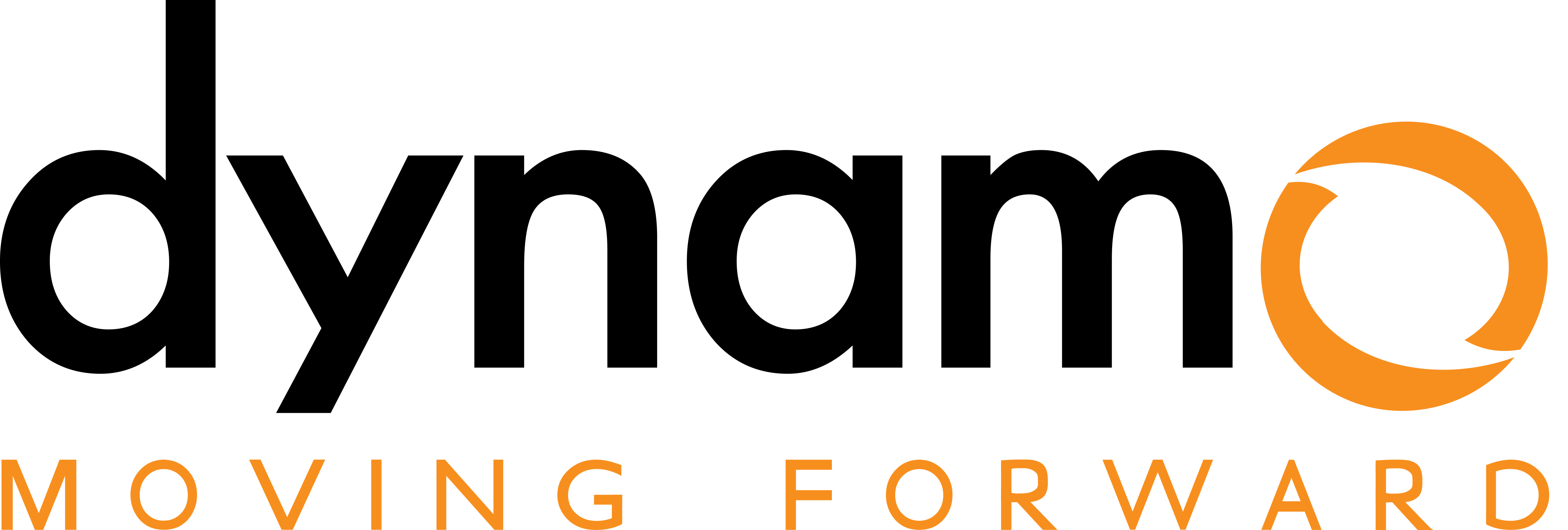 Logo De Dynamo Producciones